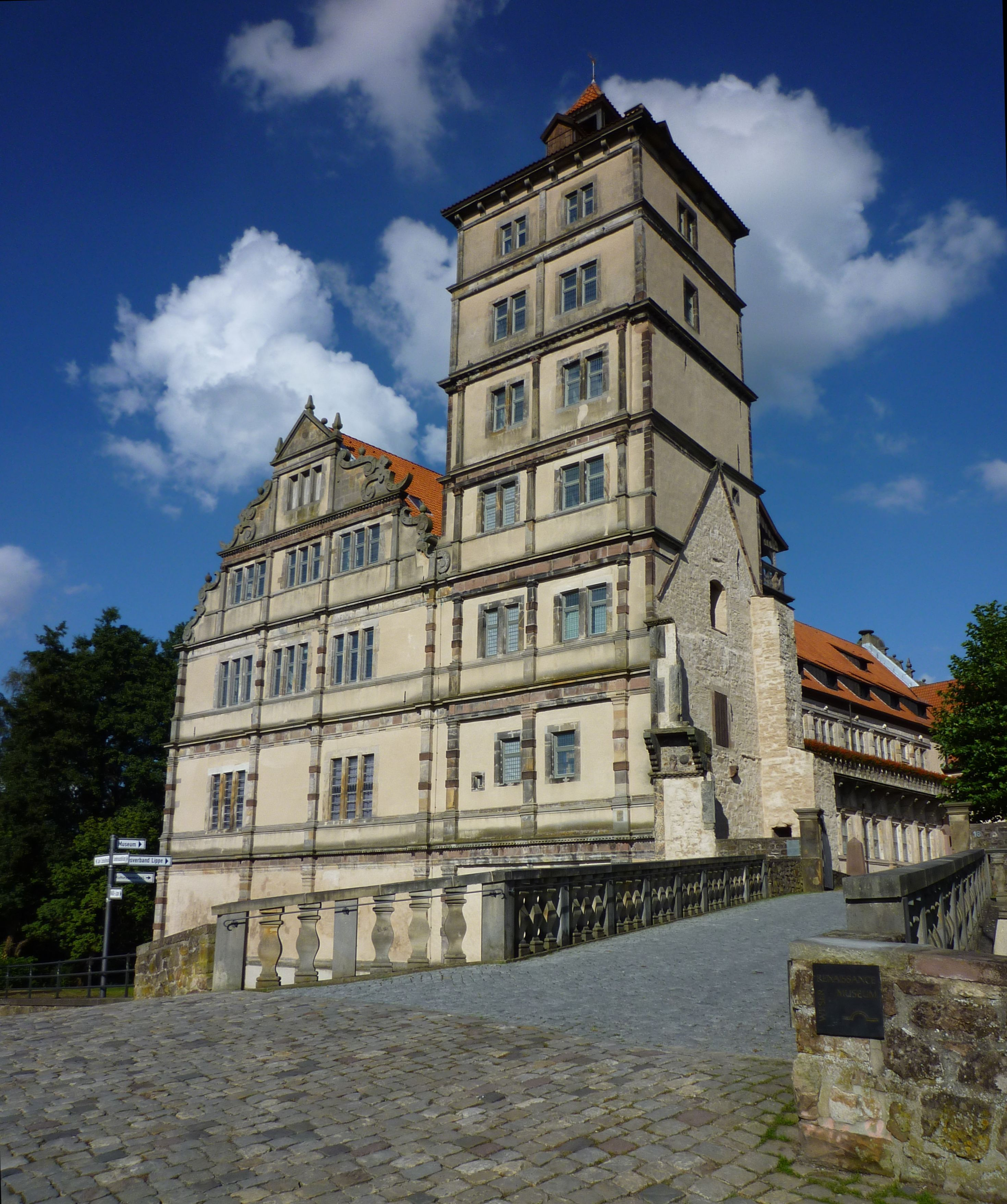 Lemgo - Schloss Brake 13. Jh.